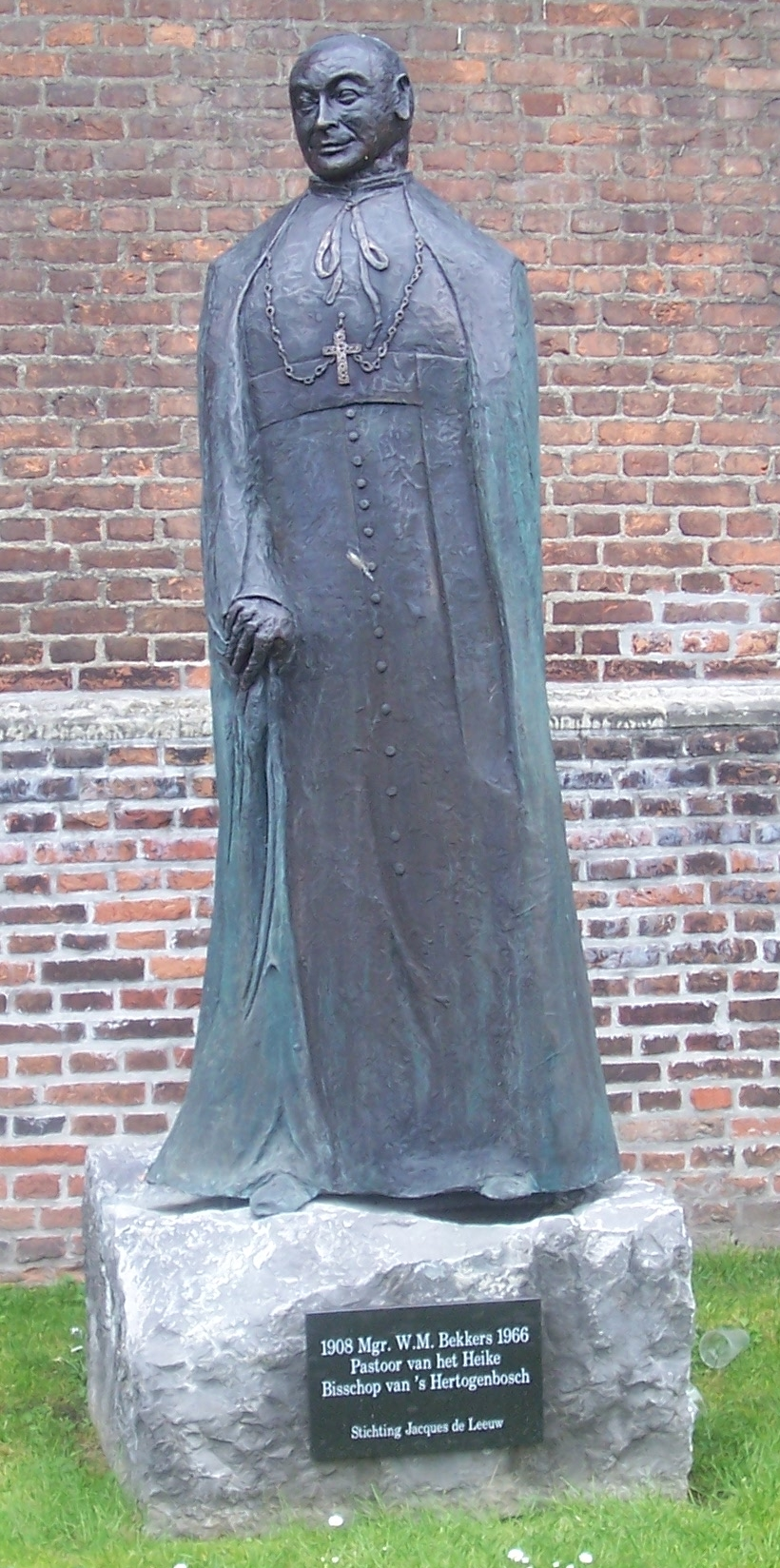 Beeld door Eugene Peters, 2010